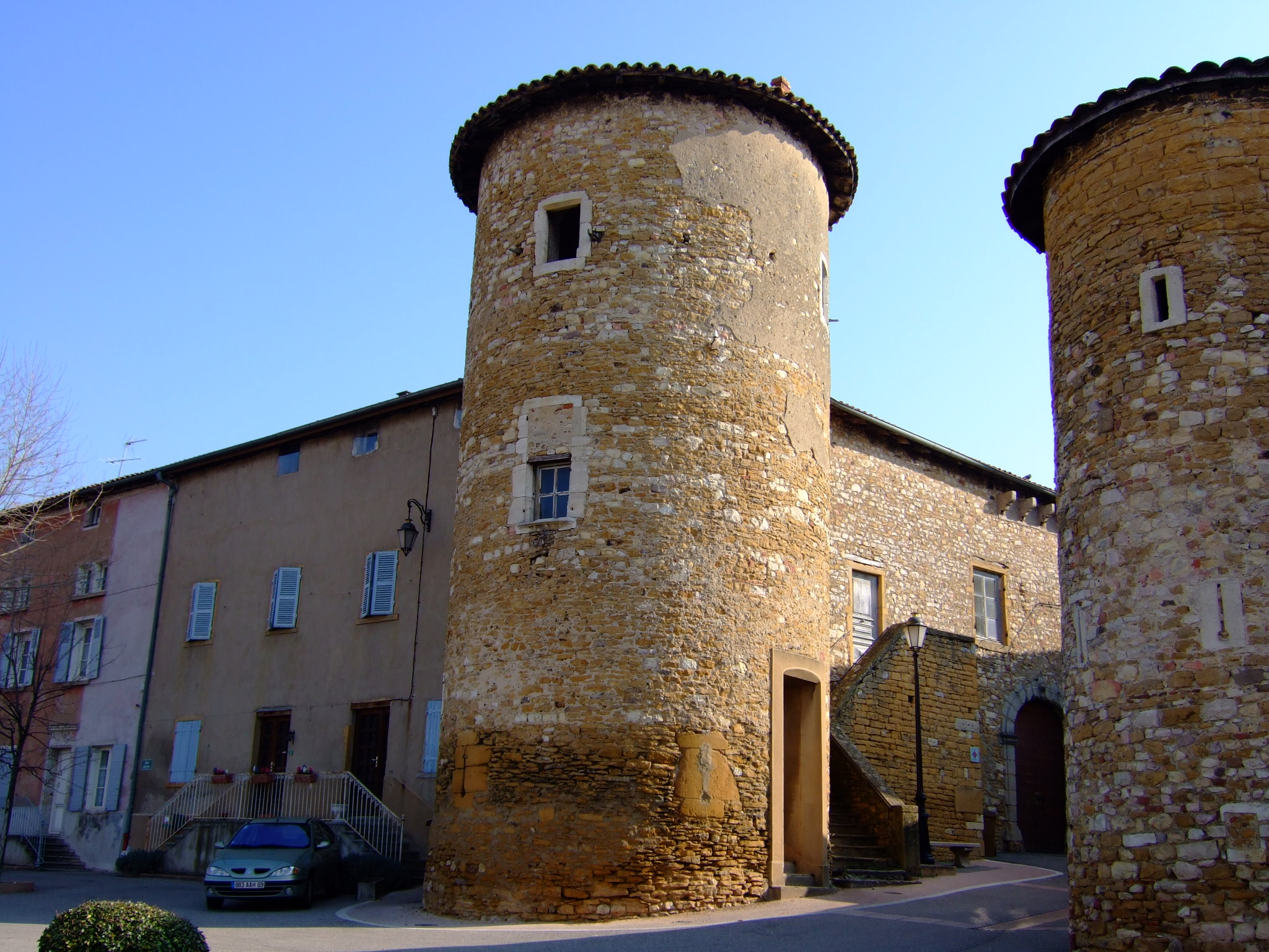 château des comtes de Lissieu